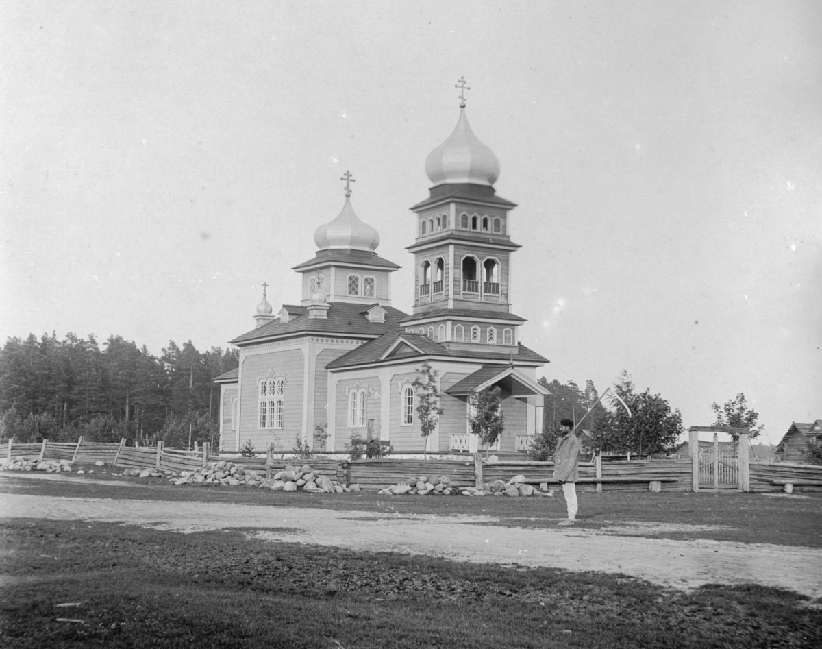 Беларуская (тарашкевіца): Хатаевічы (Chatajevičy). Царква